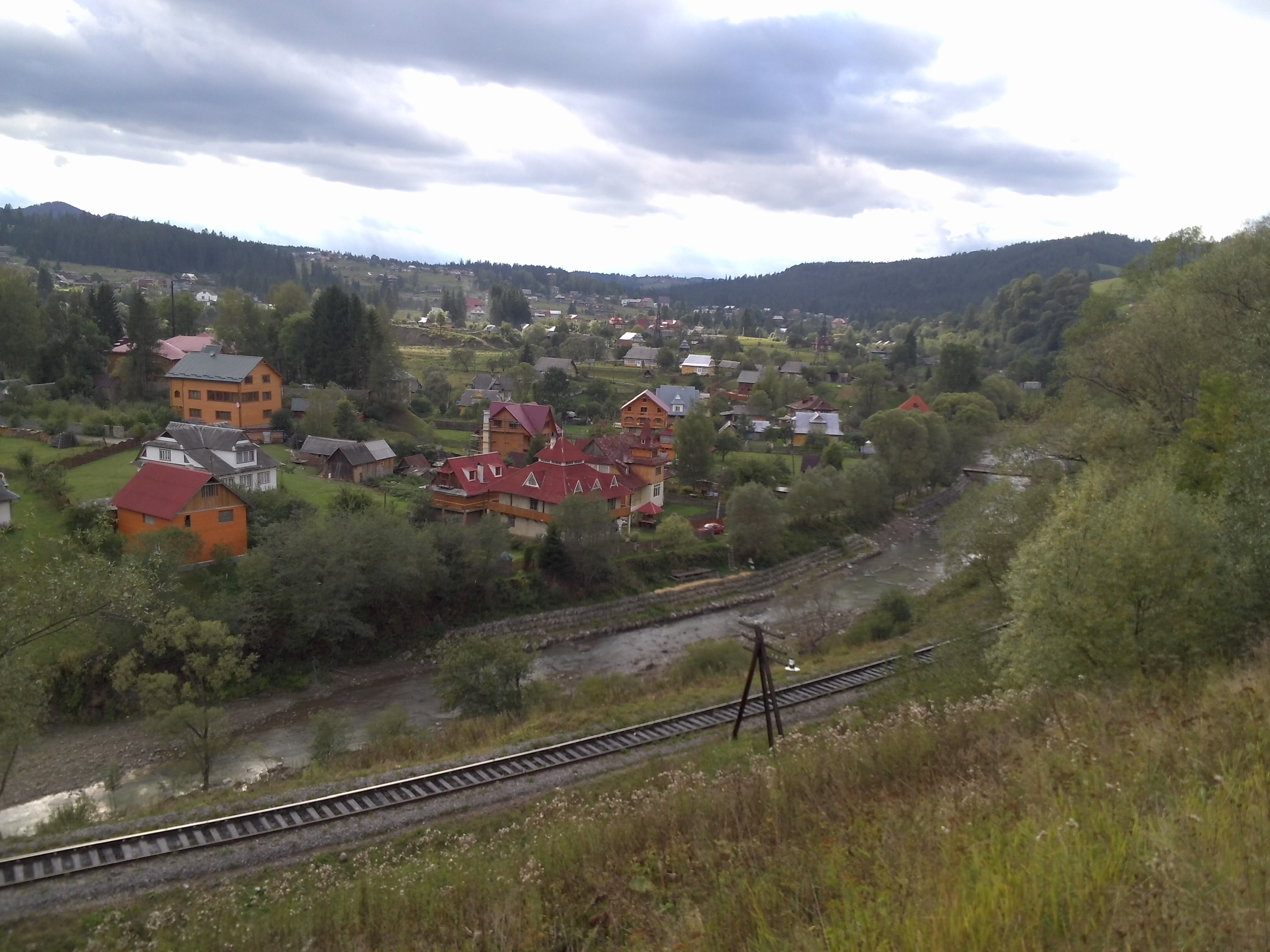 Панорама Ворохти